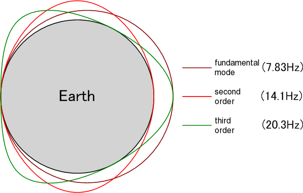 ??:Neotesla